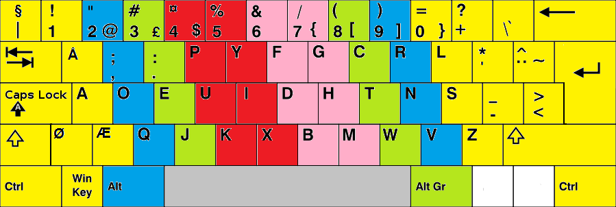 Viser Touch-metoden for et norsk dvorak-tastatur.